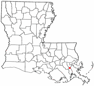 Volapük: Topam in tat: Louisiana.